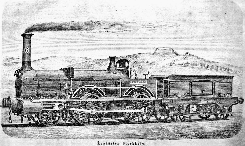 Lokomotivet "Ånghästen Stockholm" som trafikerade Stockholm – Saltskog, 1860–1862